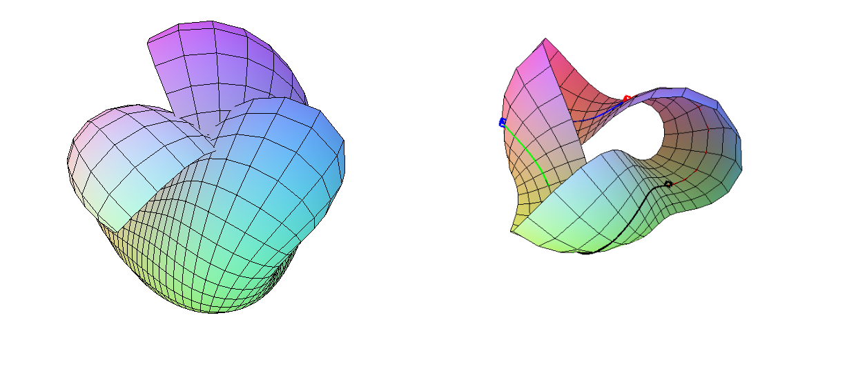 Surface de Boy découpée en deux parties, l'une homéomorphe à un disque, l'autre à une bande de Möbius